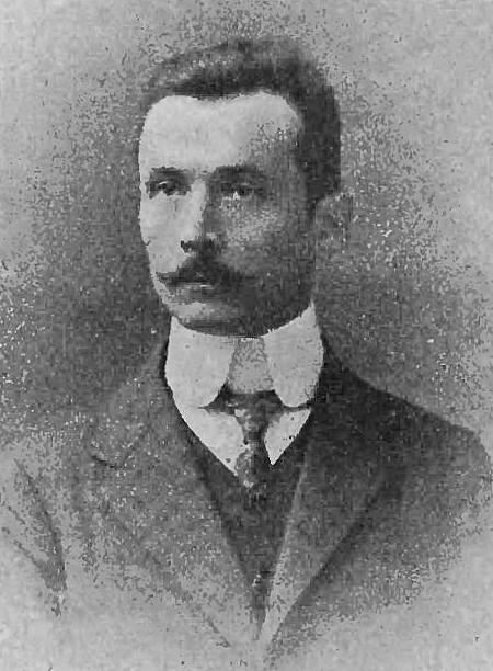 Stanisław Stohandel (-1907)